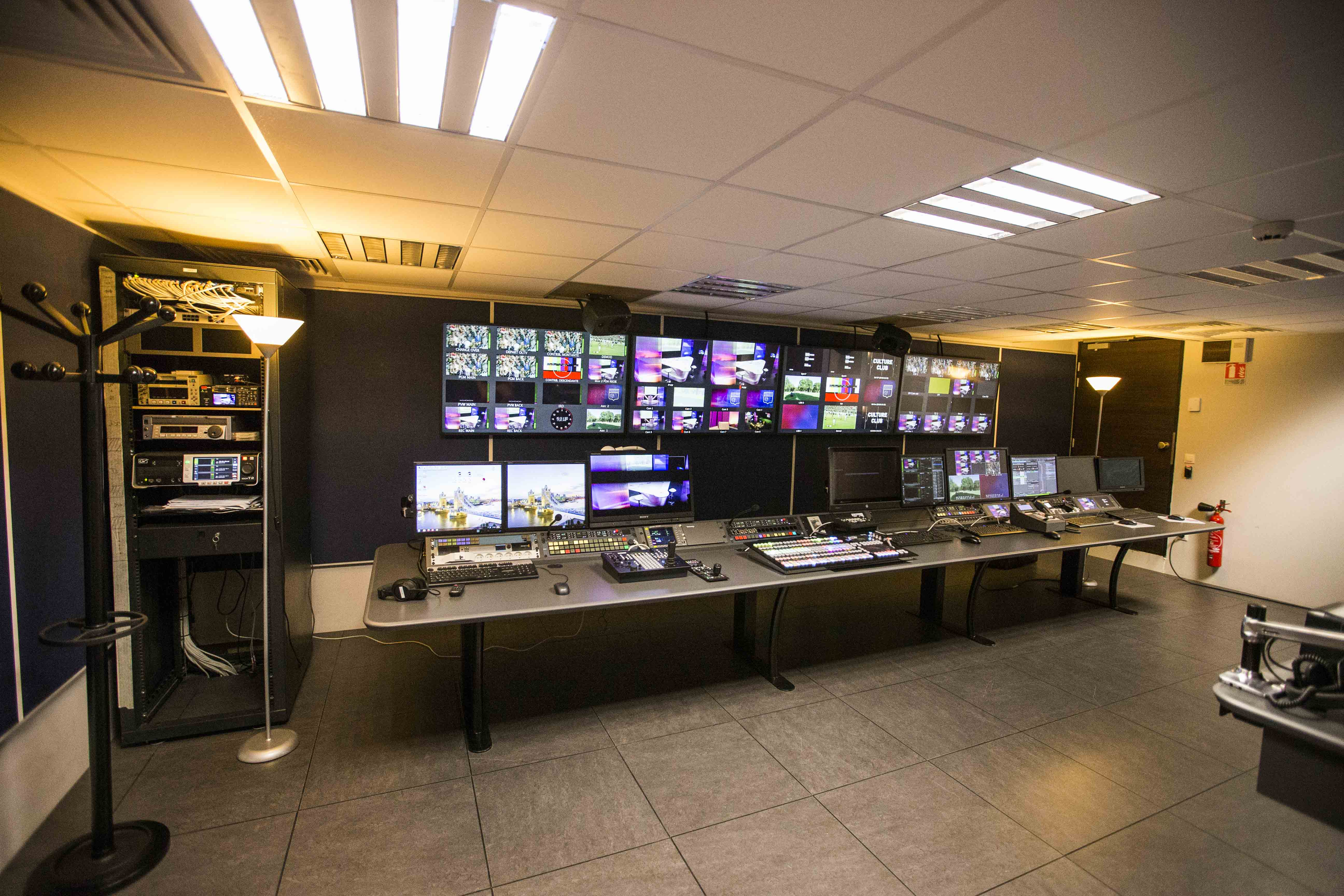 La régie OLTV